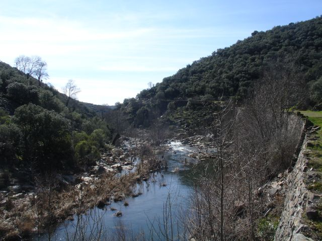 río Estena a su paso por el boquerón del Estena